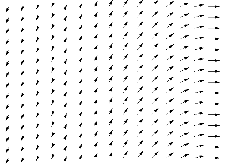 Vektorove pole - ilustrace. Vygenerovano programem Mathematica 5.0